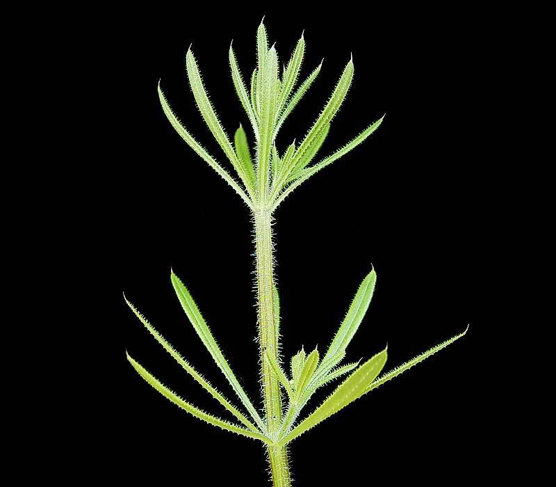 Galium aparine